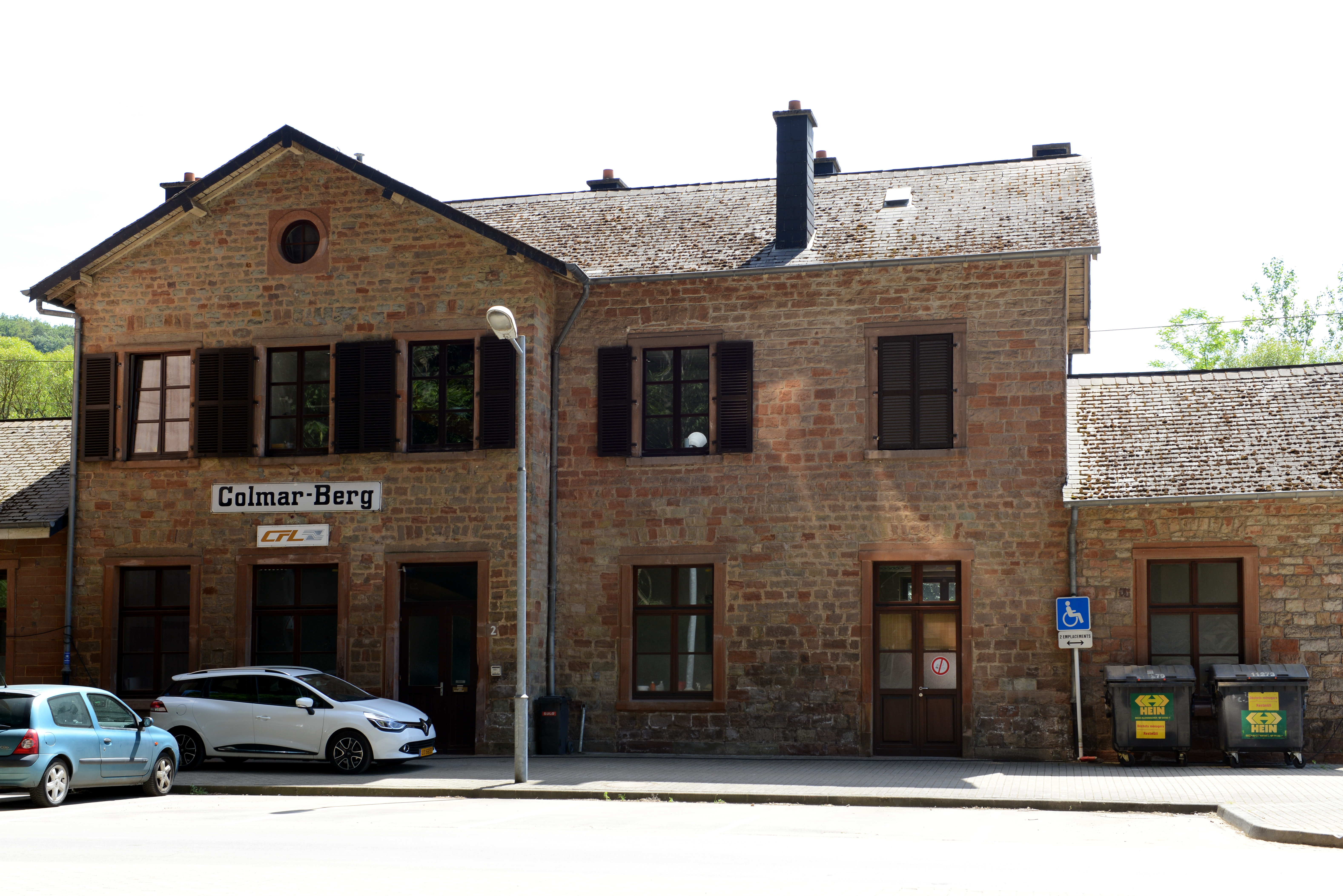 D'Gare Colmer-Bierg.